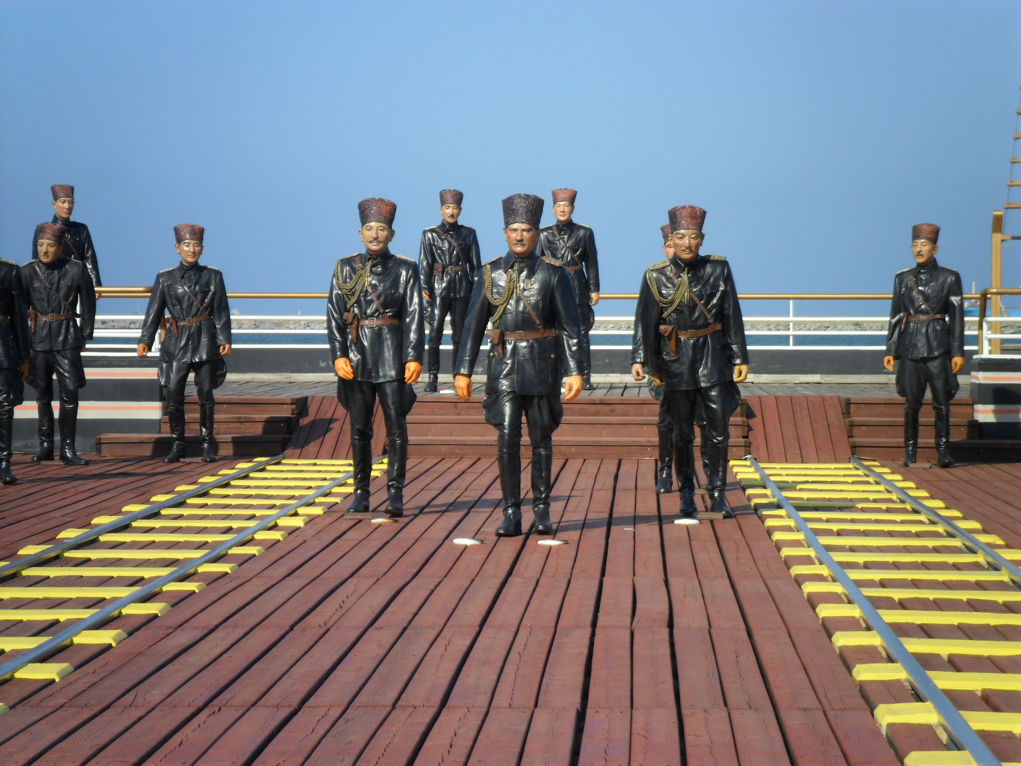 Mustafa Kemal'in Samsun'a çıktığı Tütün İskelesi'ndeki balmumu heykellerin yakından görünümü.